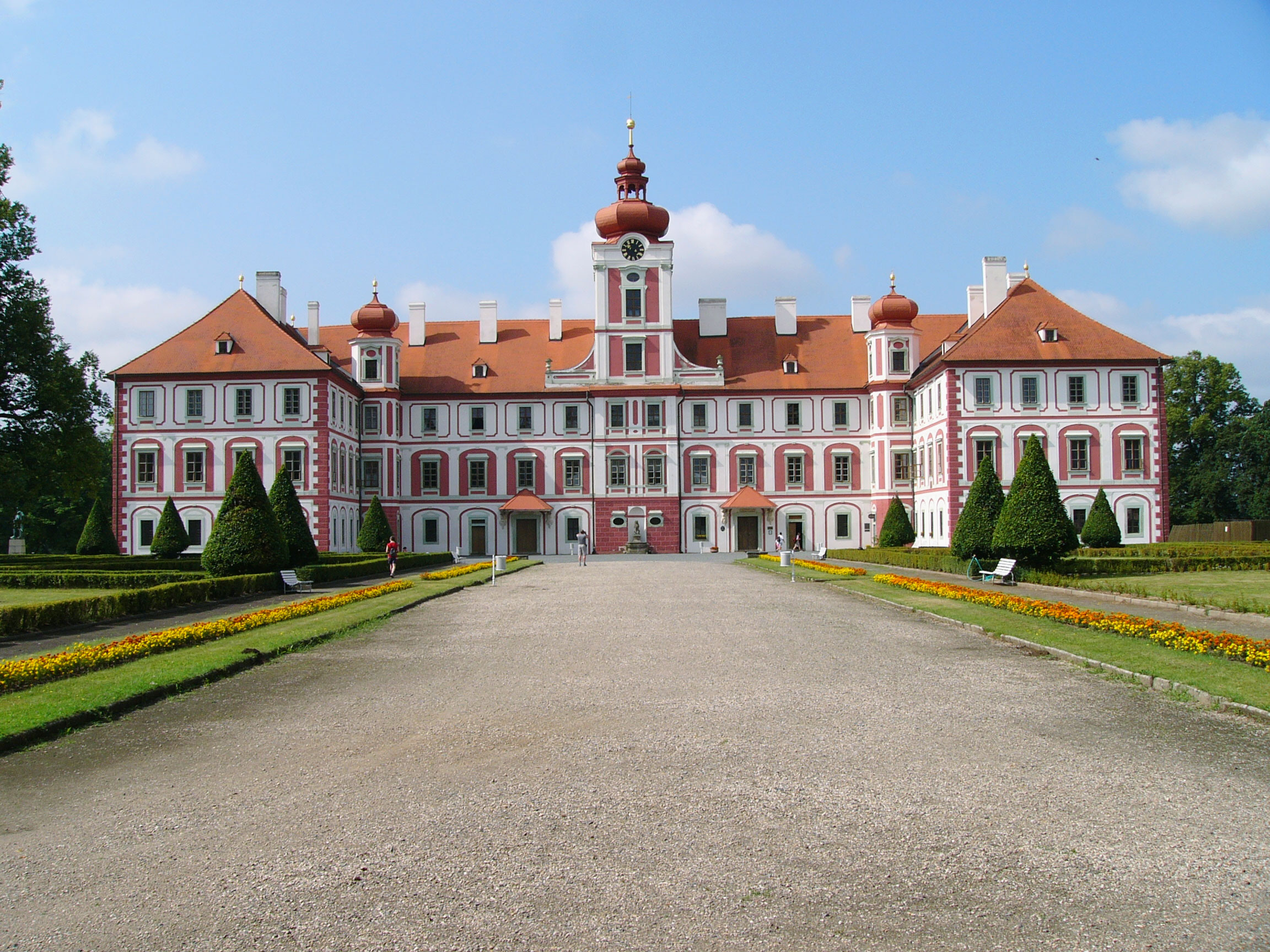 Celkový pohled na zámek Mnichovo Hradiště od sala terreny na severovýchodě